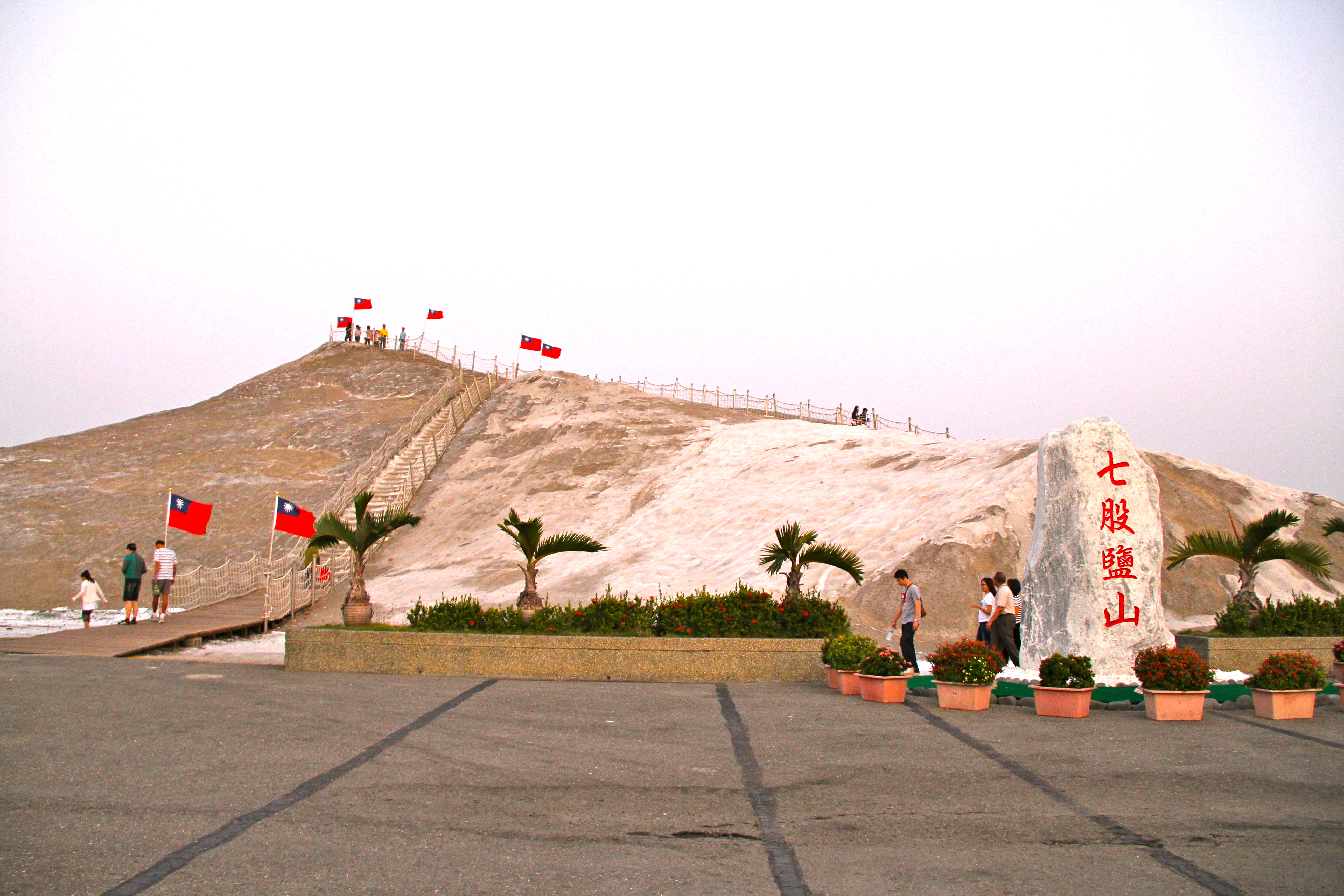 Salt Mountain,Chigu,Tainan,Taiwan 台灣台南七股鹽山